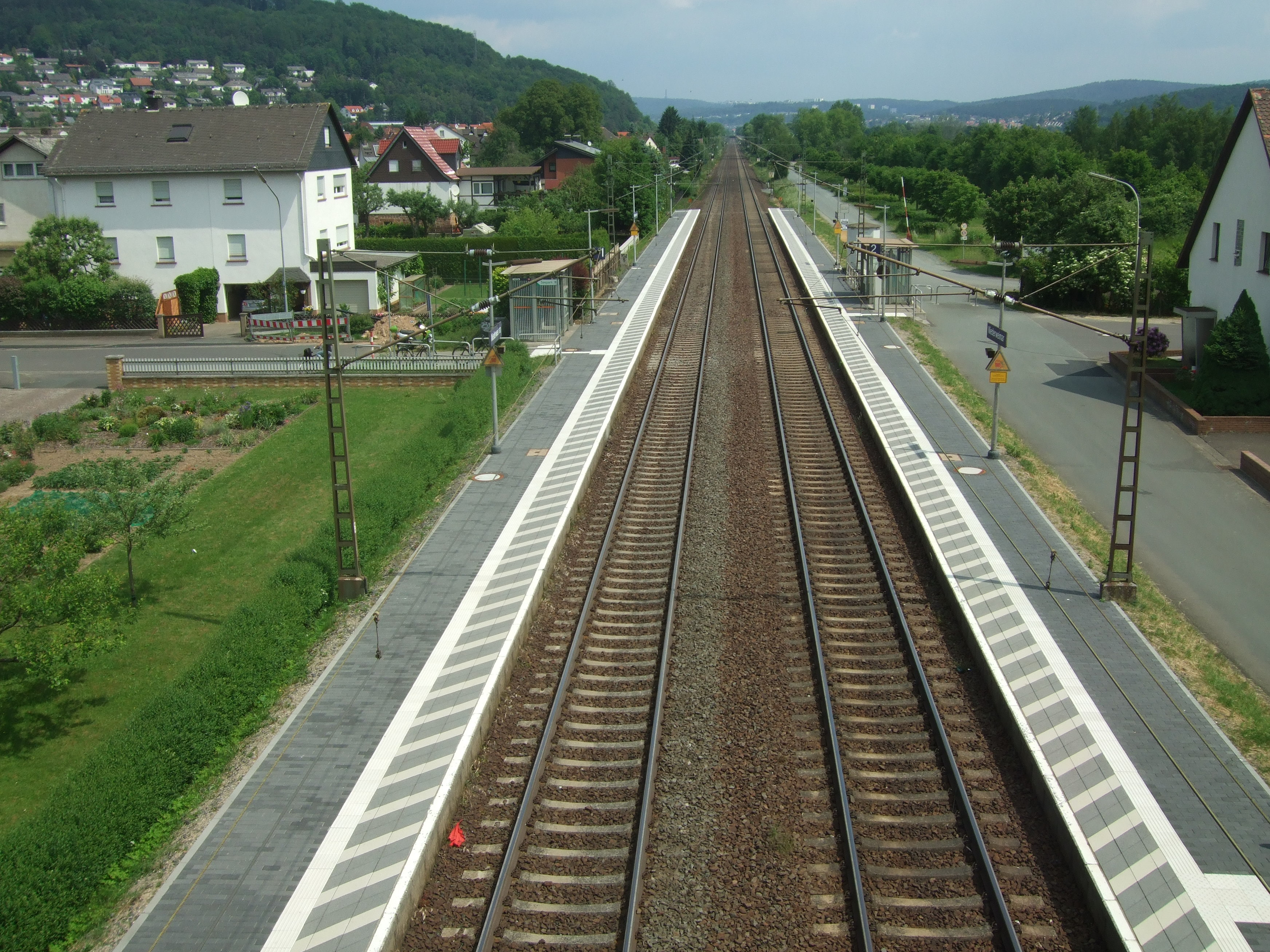 Bahnhof Niederweimar im Landkreis Marburg-Biedenkopf